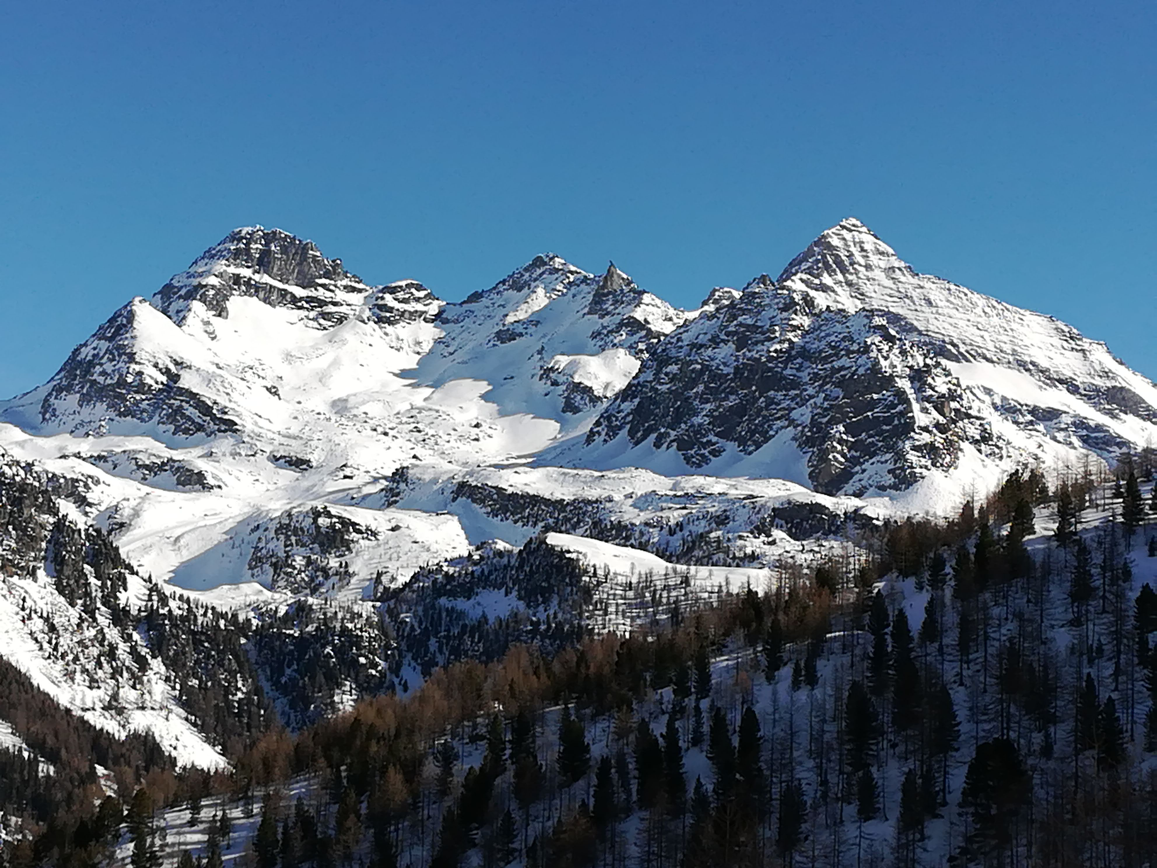 Il Rothorn (a sinistra) e la Testa Grigia (a destra) visti salendo il Vallone di Nana (in Val d'Ayas).